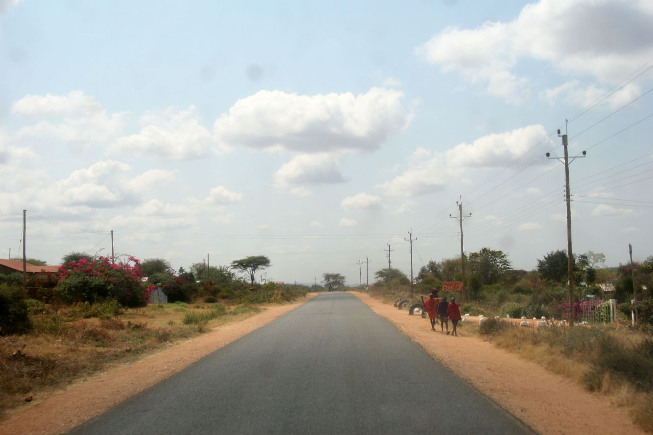 Kenya, Route de Nairobi à Arusha